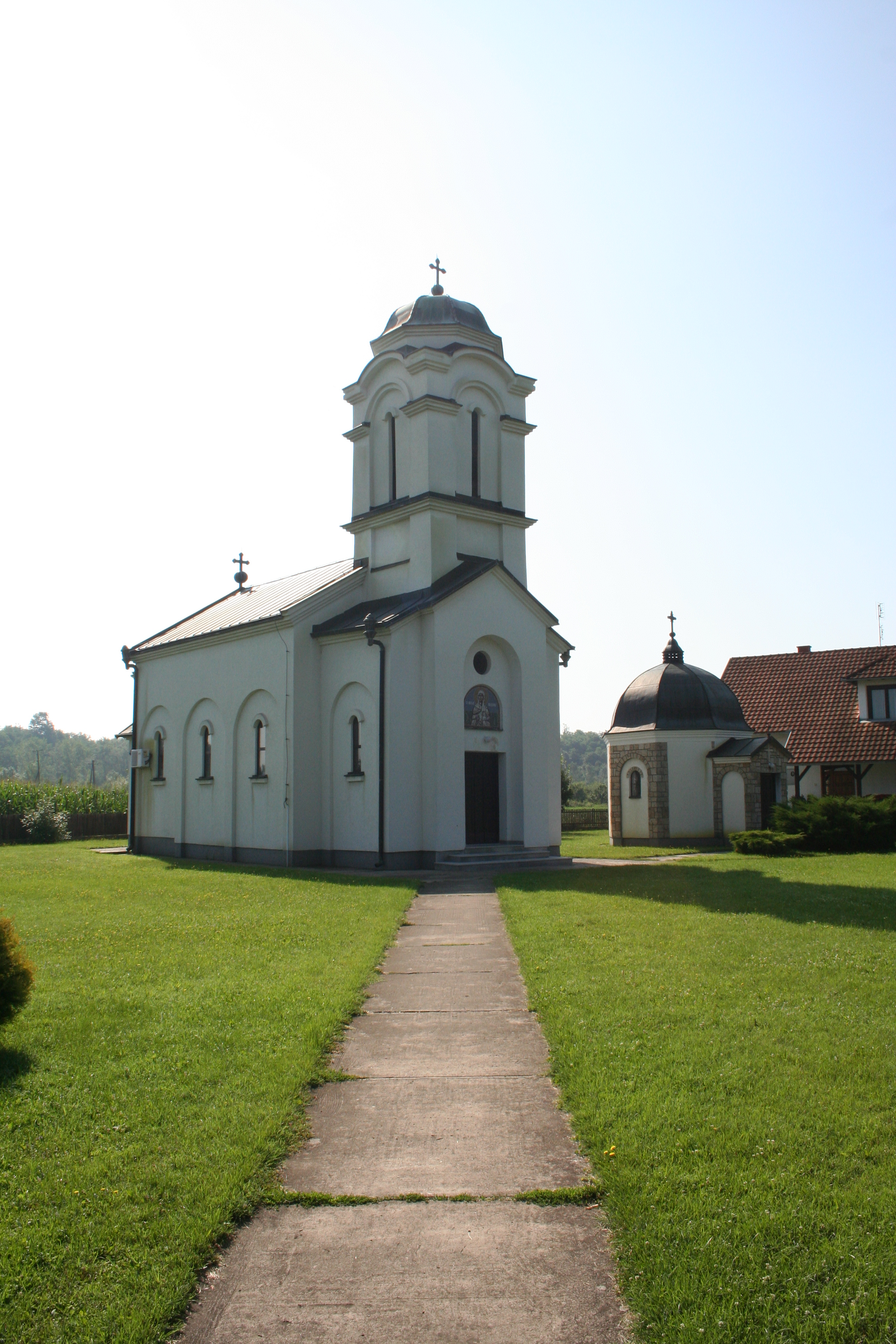 Crkva Sv. Marije Magdaline, Kozjak